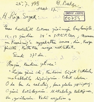 25 Temmuz 1938, İnönü Arşivi